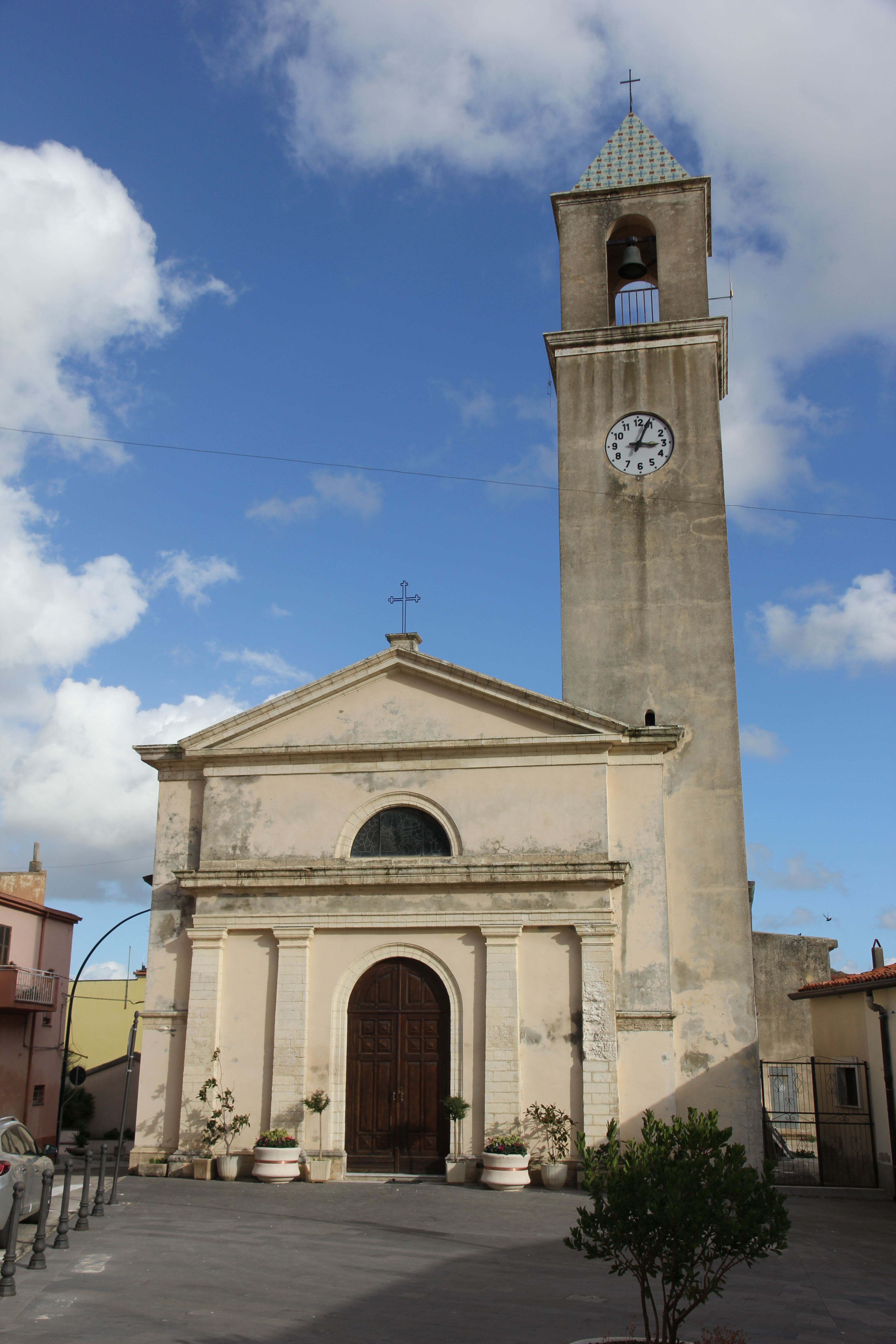 Bonnanaro - Chiesa Parrocchiale di San Giorgio